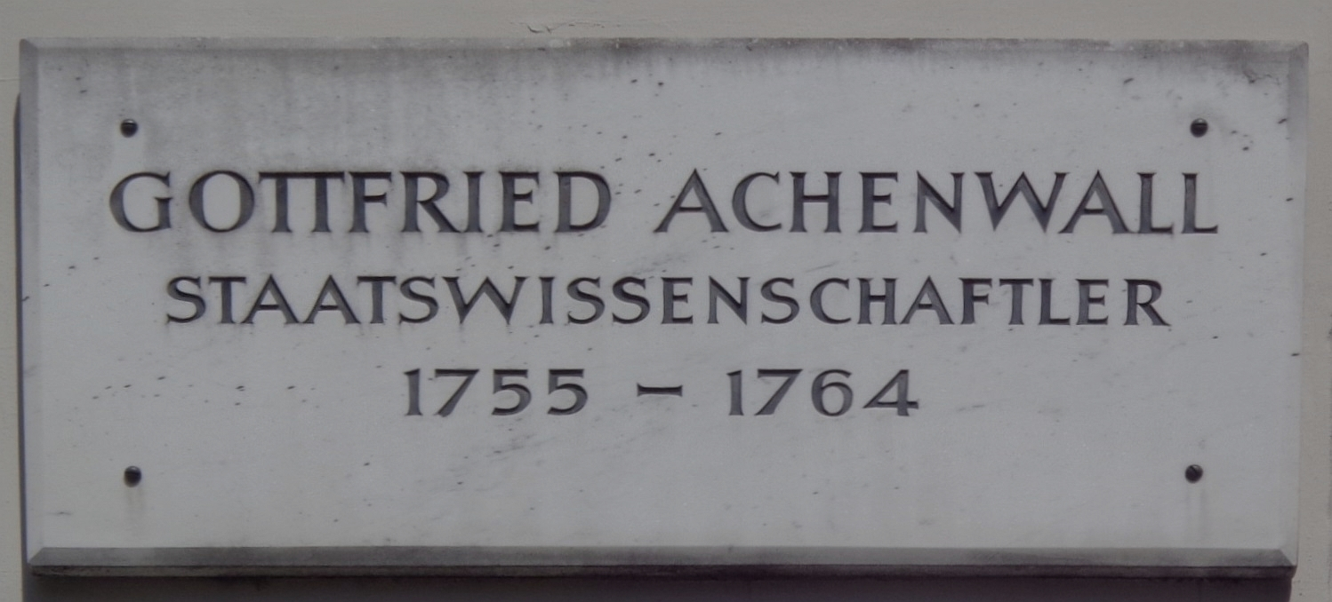 Göttinger Gedenktafel für Gottfried Achenwall, der sich als Historiker und Jurist besonders mit der Statistik beschäftigte (Goetheallee 13)